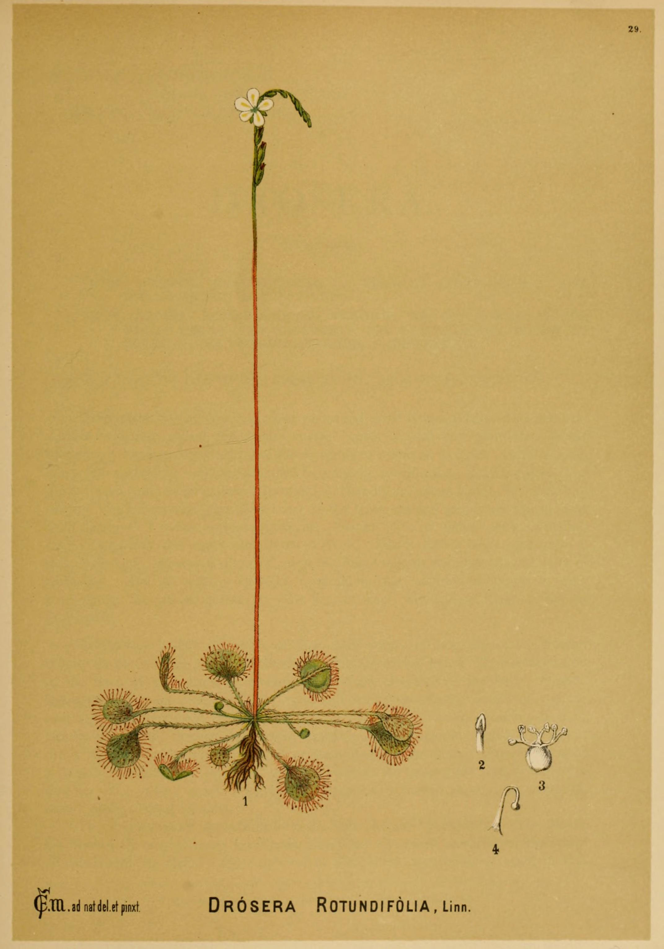 r f j^» 1 ' .TQ..iiinatiJel.et